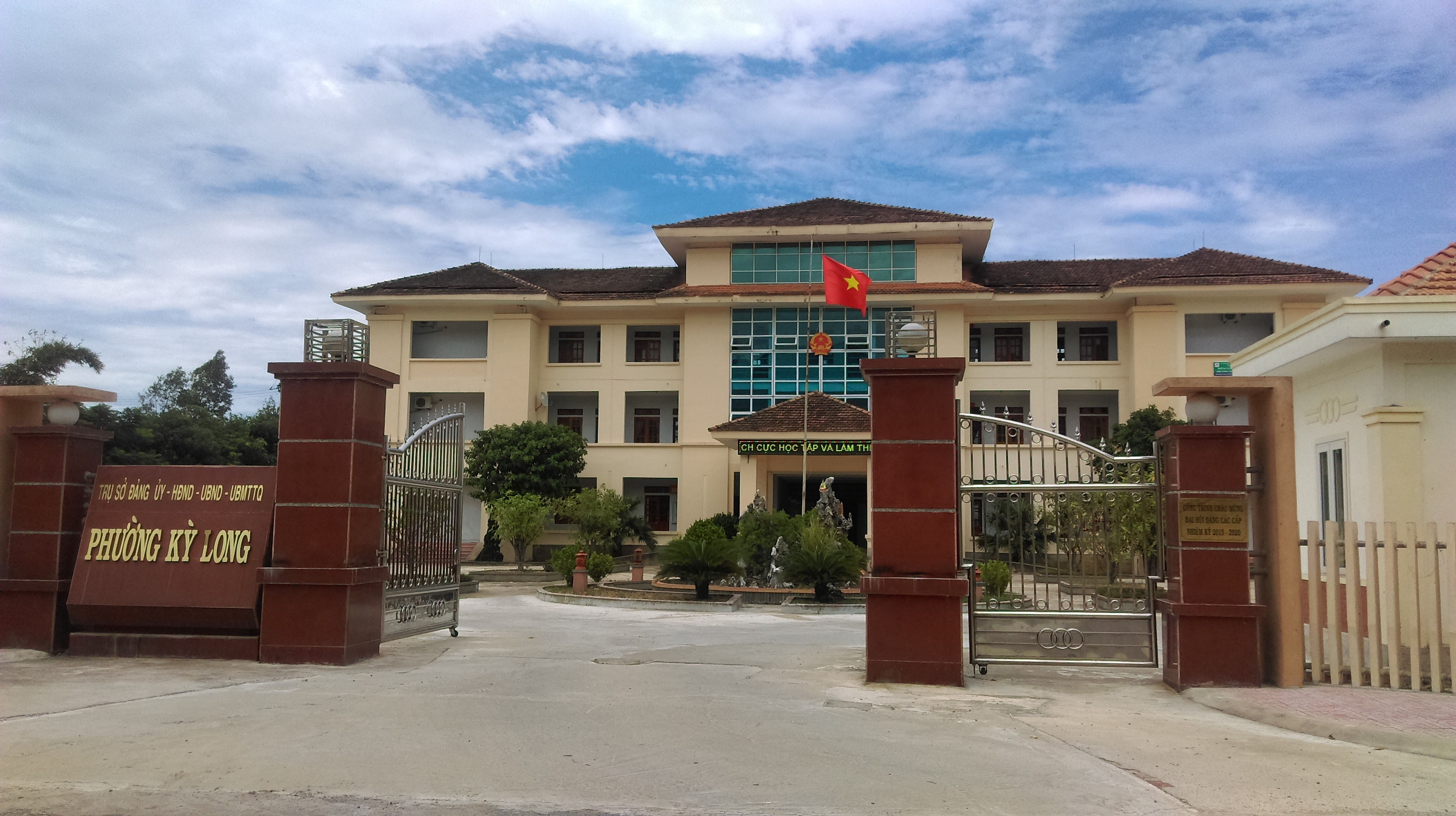 UBND phường Kỳ Long, Kỳ Anh, Hà Tĩnh